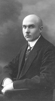 Eduard Markus